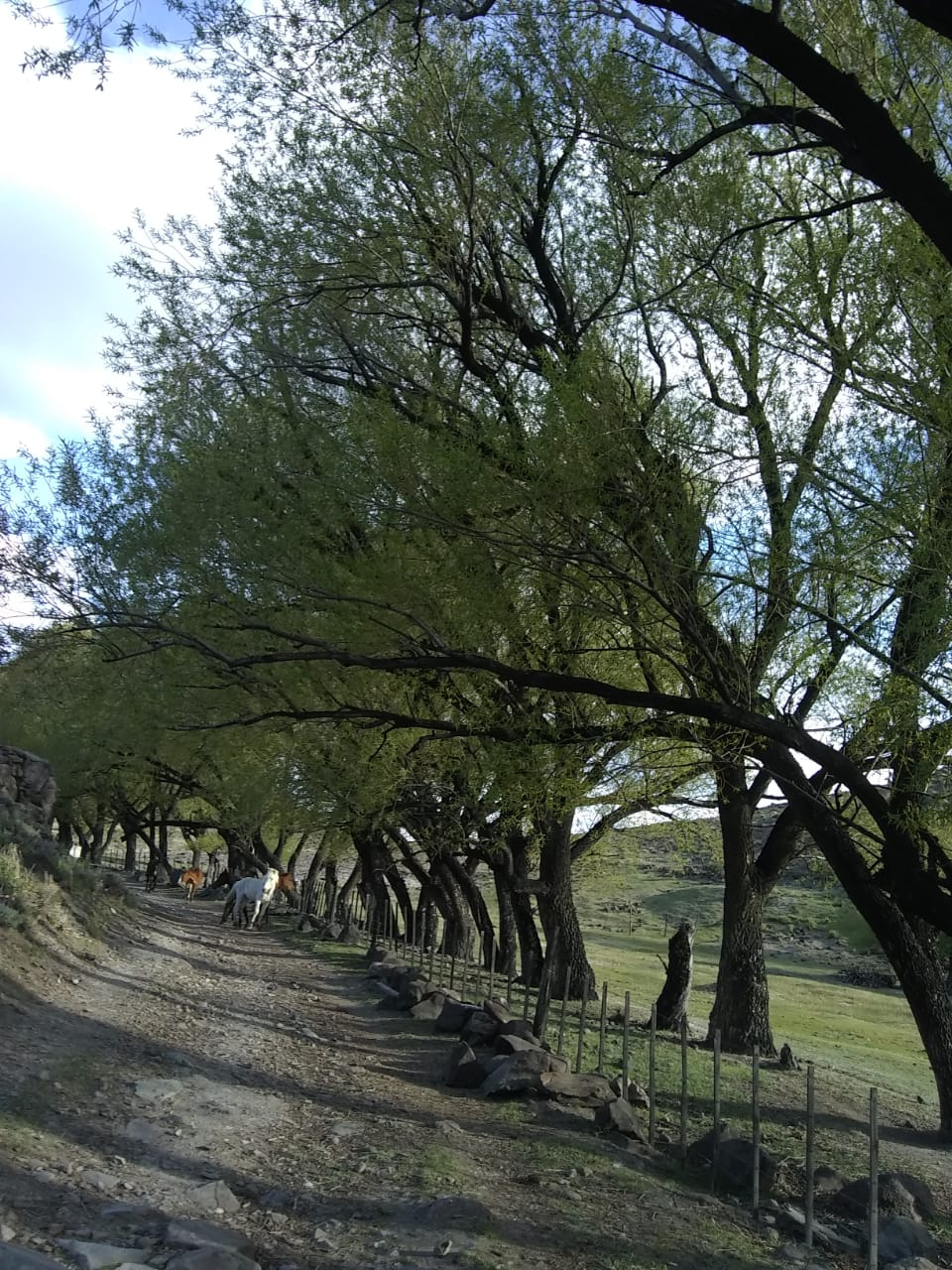 Camino a las chacras. Verano 2019